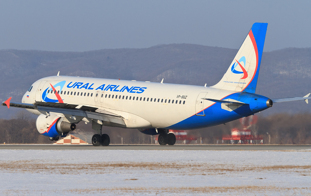 _MG_0096-2